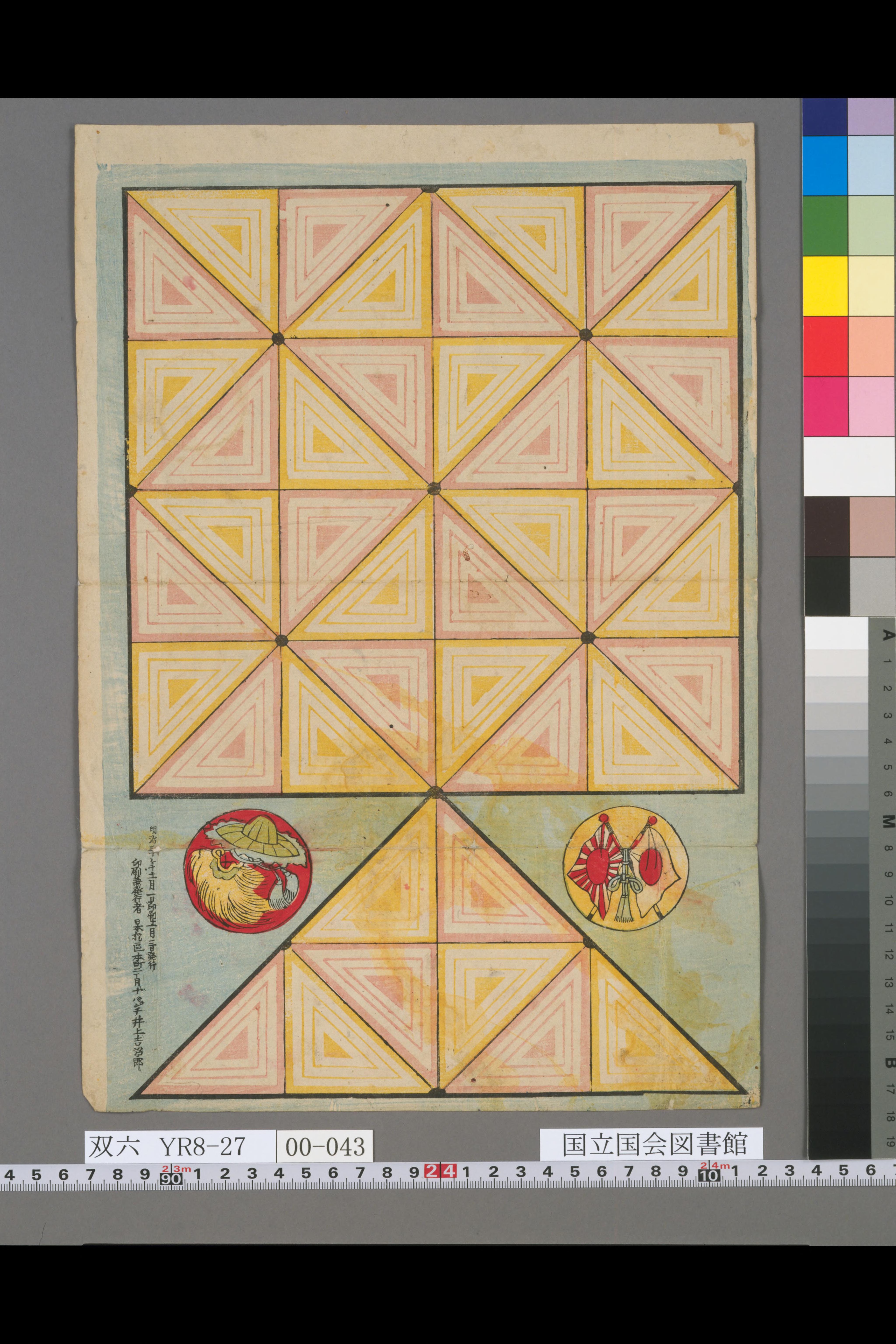 タイトル：各国旗尽十六むさし